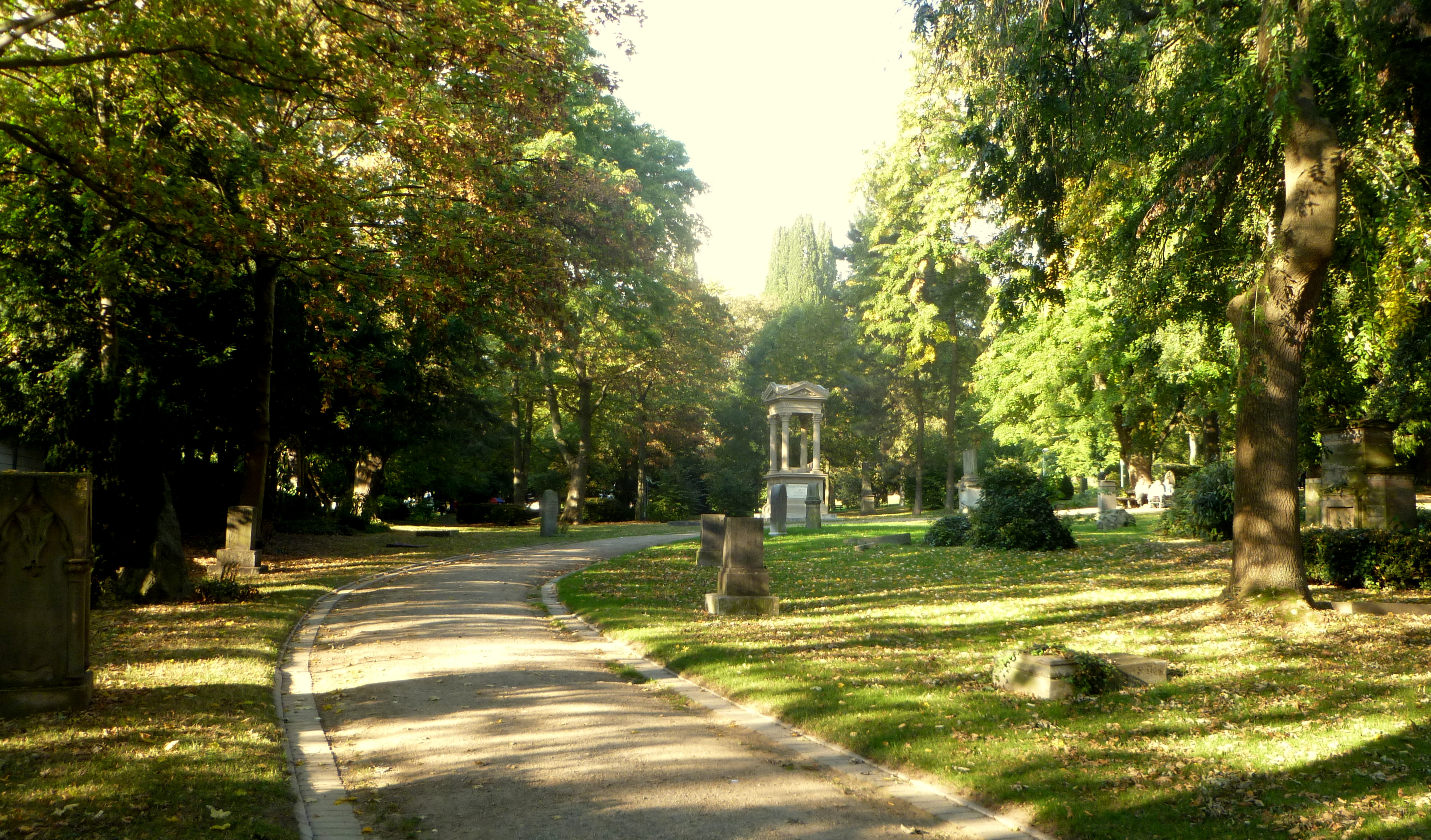 Ansicht Friedhof Güldenplan im Stadtgarten Aachen